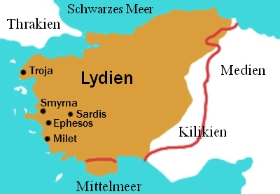 Lydien in der Mitte des 6. Jahrhunderts v. Chr. unter König Kroisus. Die rote Grenzlinie zeigt eine leicht geänderte Fassung des Grenzverlaufs.